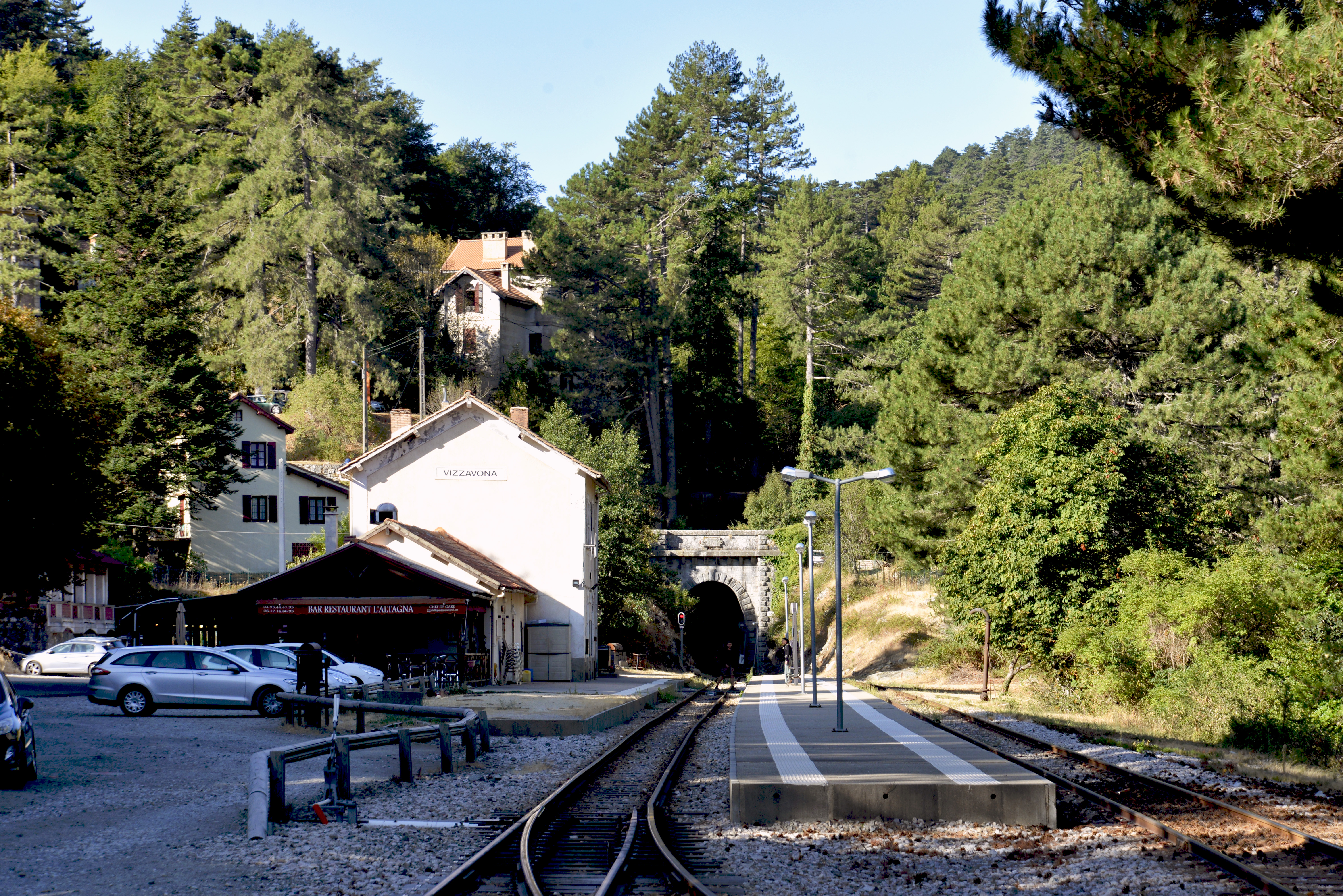 Vivario, Centre Corse - La gare de Vizzavona.